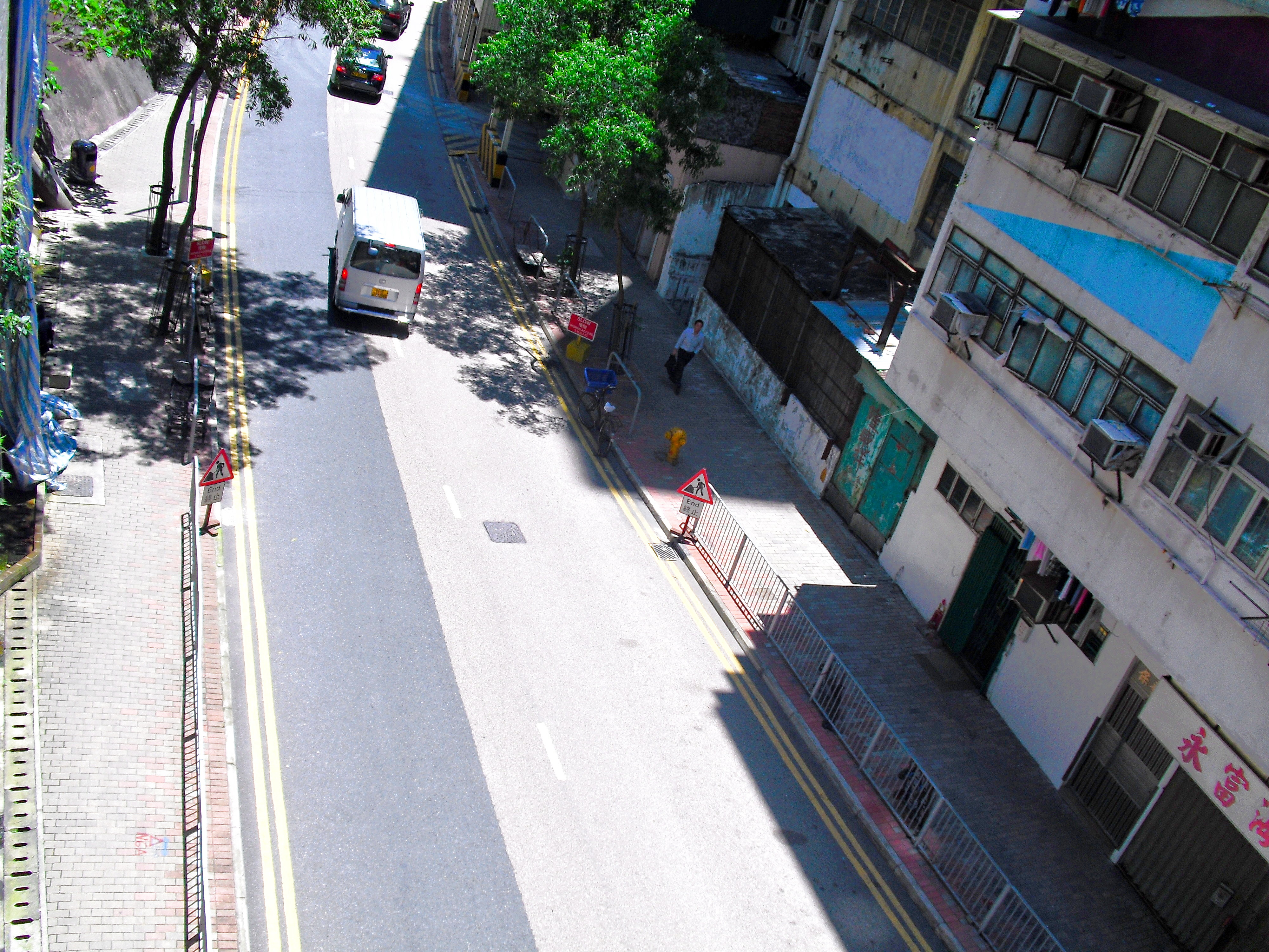 石山街